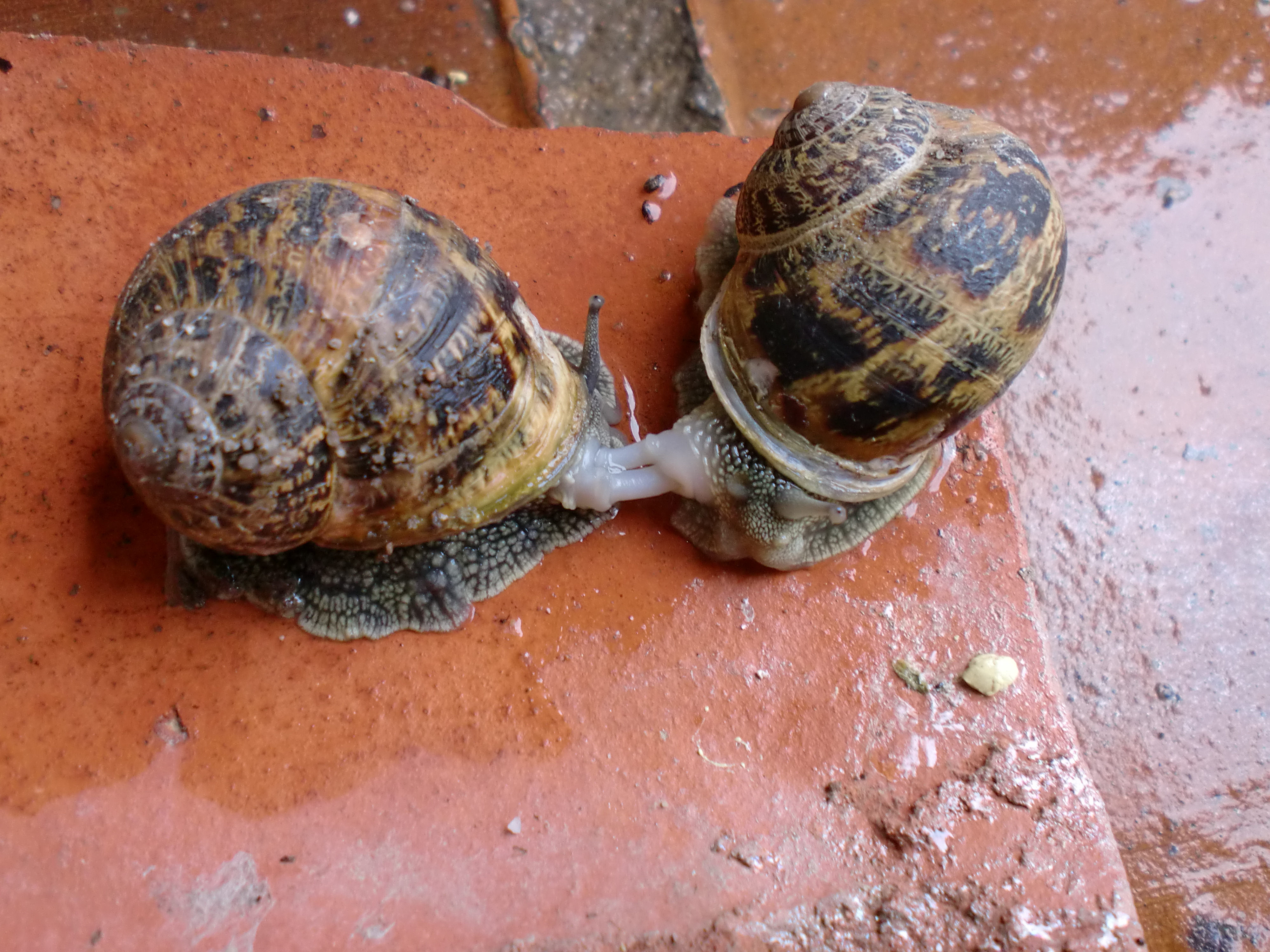 Dos especímenes de caracol terrestre común copulando, Espana.